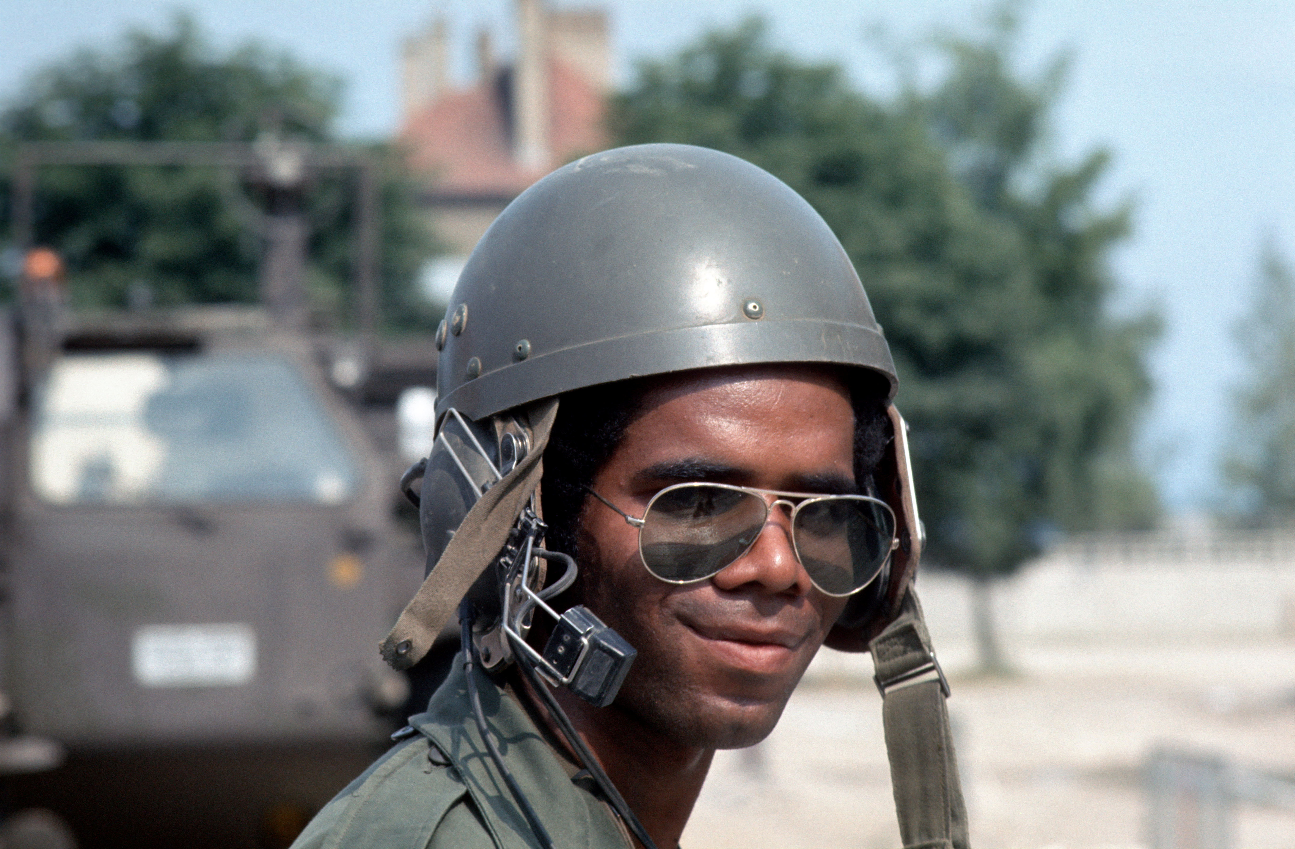 Portes Ouvertes à la caserne Abbatucci. 2e SM Edmond, 9/5 2e Section.